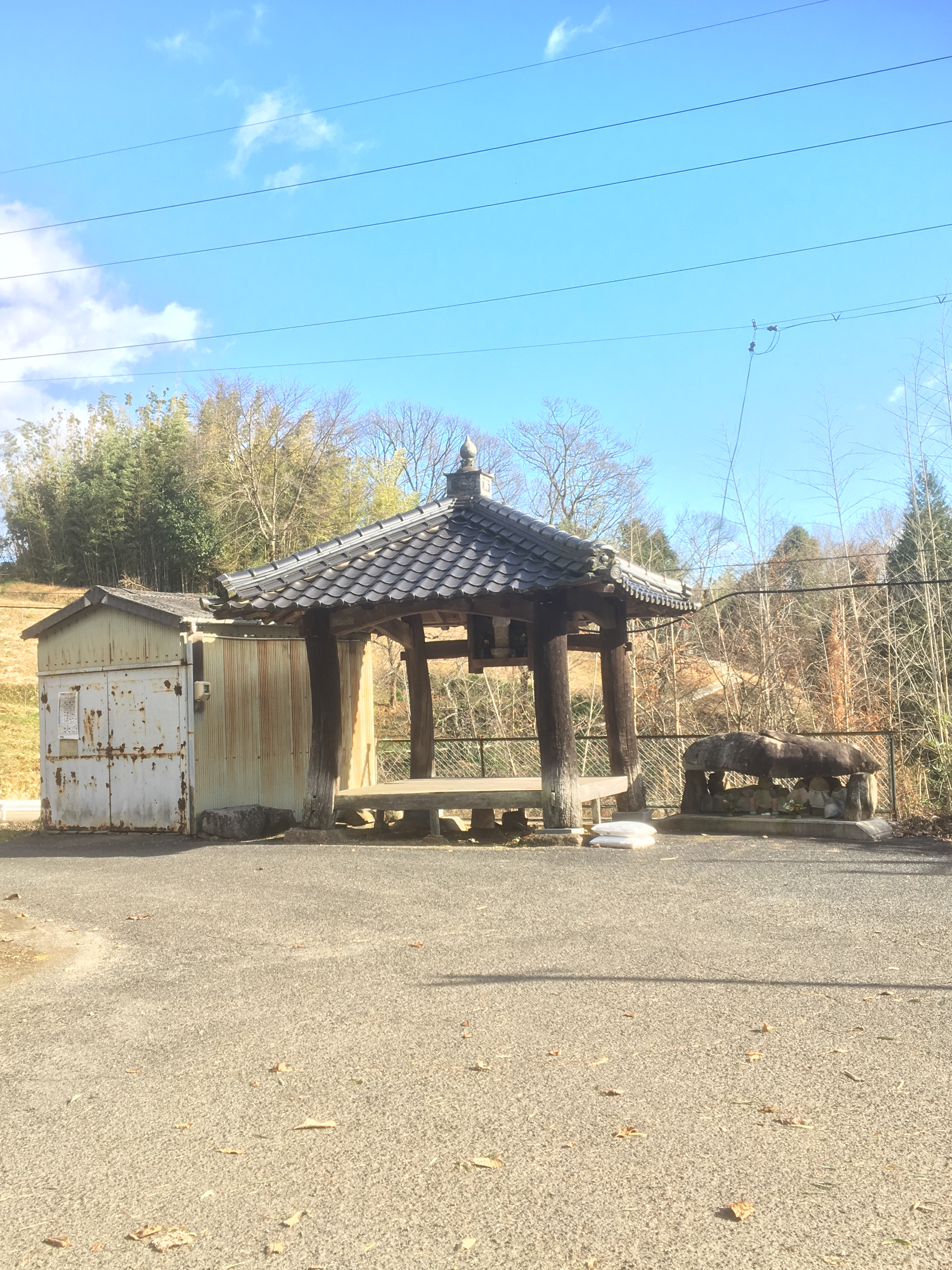 尾道市御調町大塔の辻堂。巨大な柱が特徴的とされる。